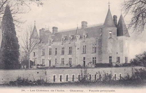 Le château